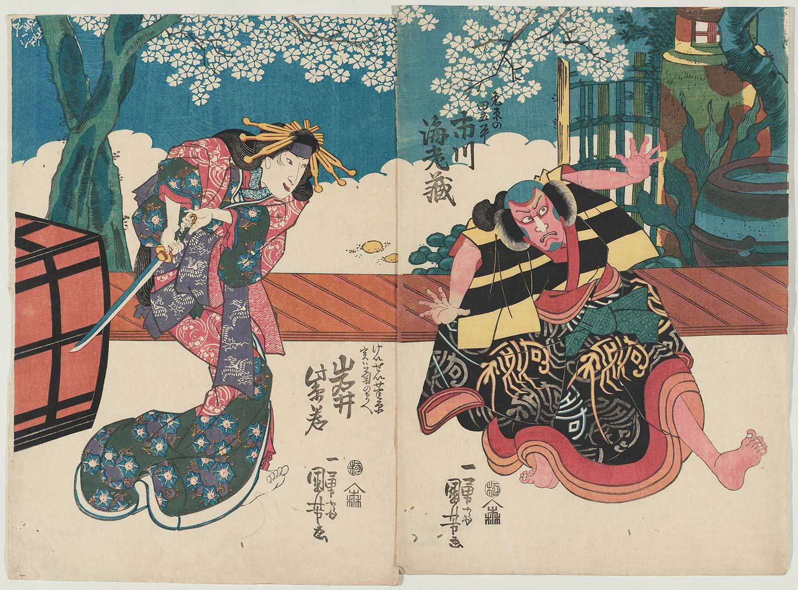 Kabuki Scene from "Ichinotani Futaba Gunki", Act 4 （『一谷嫩軍記』 四段目より）